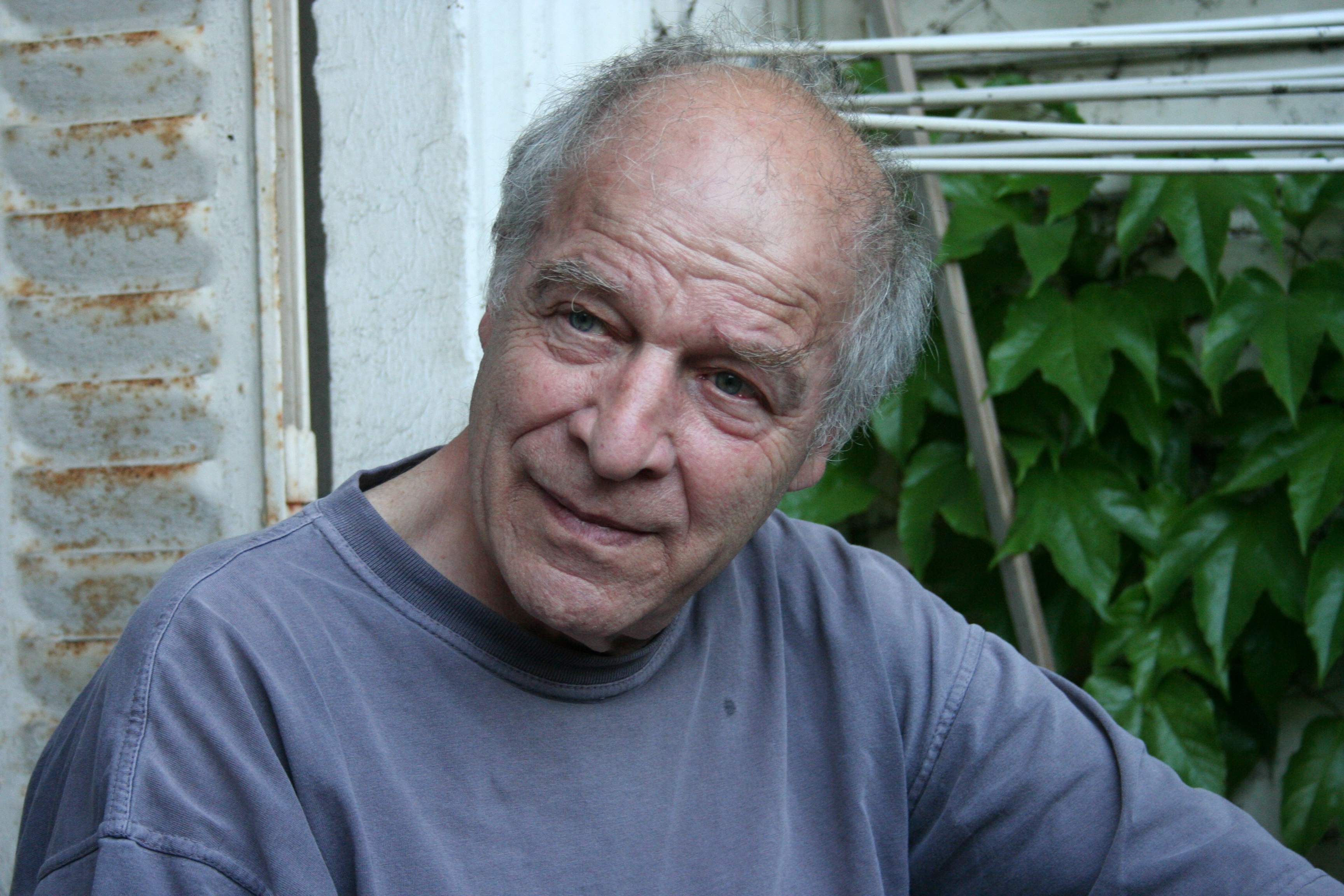 Portrait Maurice Failevic